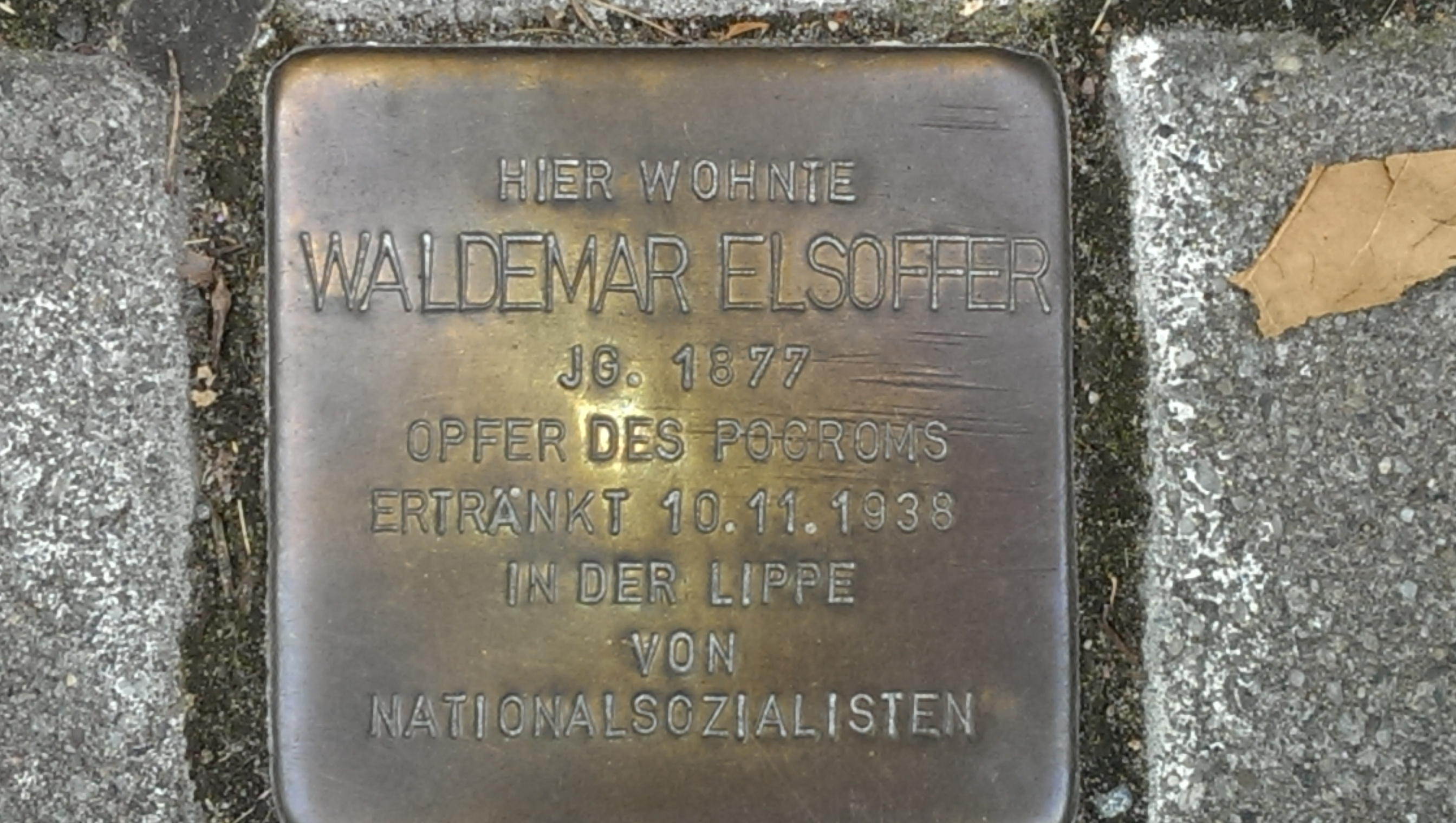 Stolperstein von Waldemar Elsoffer in Lünen